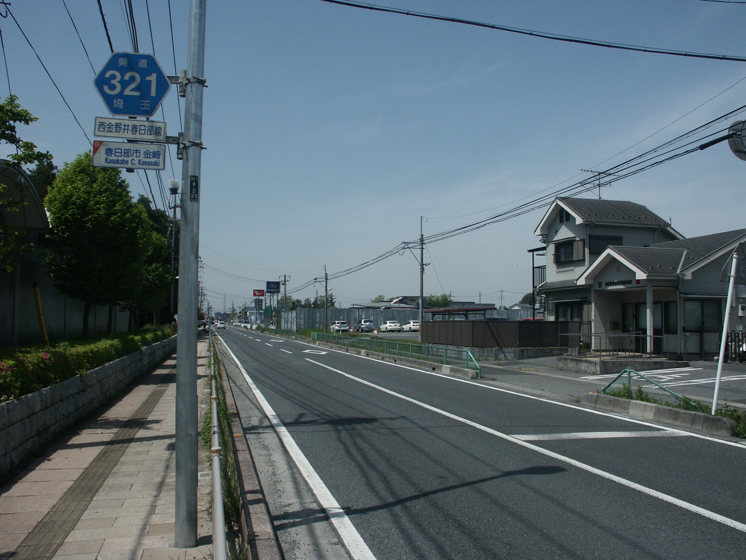 埼玉県道321号線春日部市金崎付近